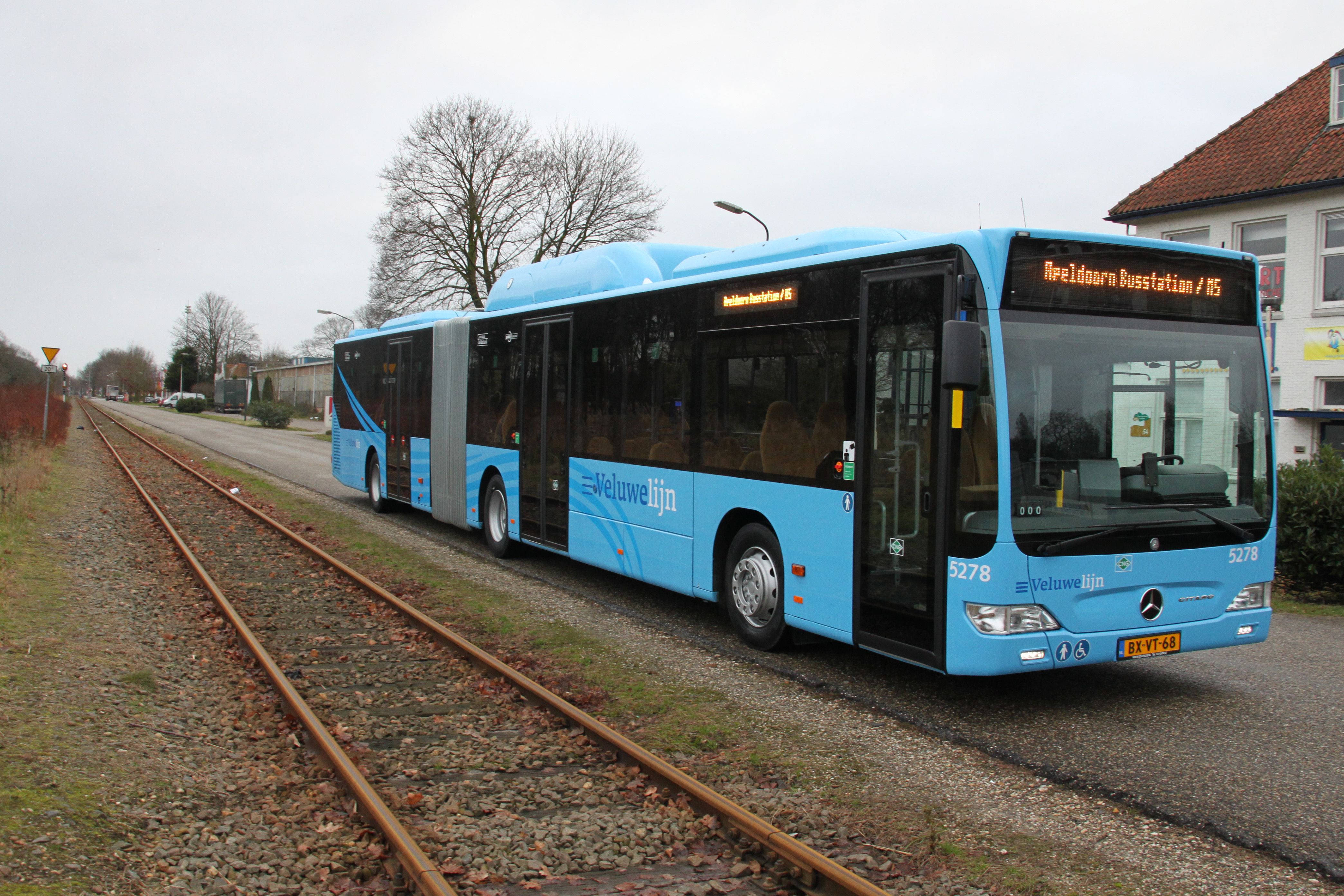 Mercedes-Benz CitaroG CNG (aardgas)bus van Syntus voor de Veluwelijn.